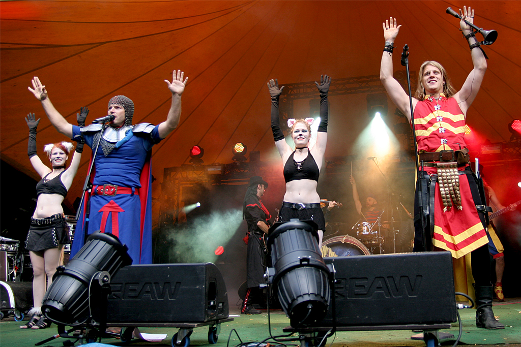 Feuerschwanz am 25. August 2012 auf dem Feuertal Festival